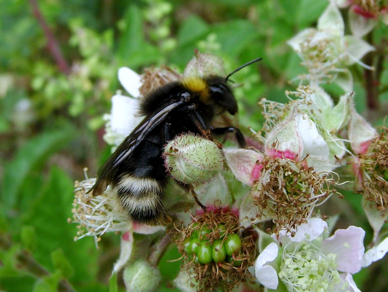 Bombus norvegicus. Location: Germany - Hochsauerlandkreis (Landkreis)